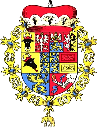 Wappen des kaiserlichen Feldherrn Albrecht Wenzel Eusebius Graf Wallenstein, Herzog von Friedland und Sagan usw., ab 1632